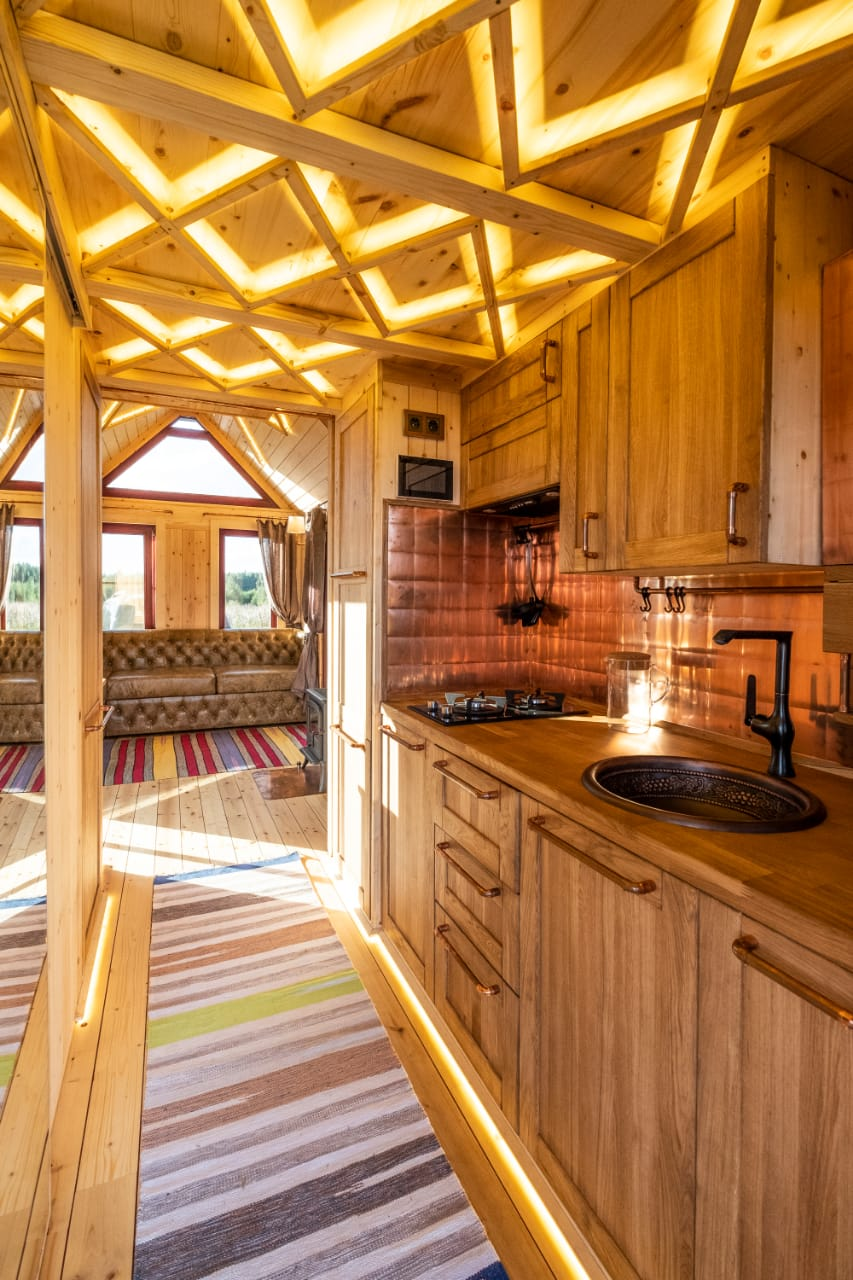 Оборудование кухни в крошечном доме